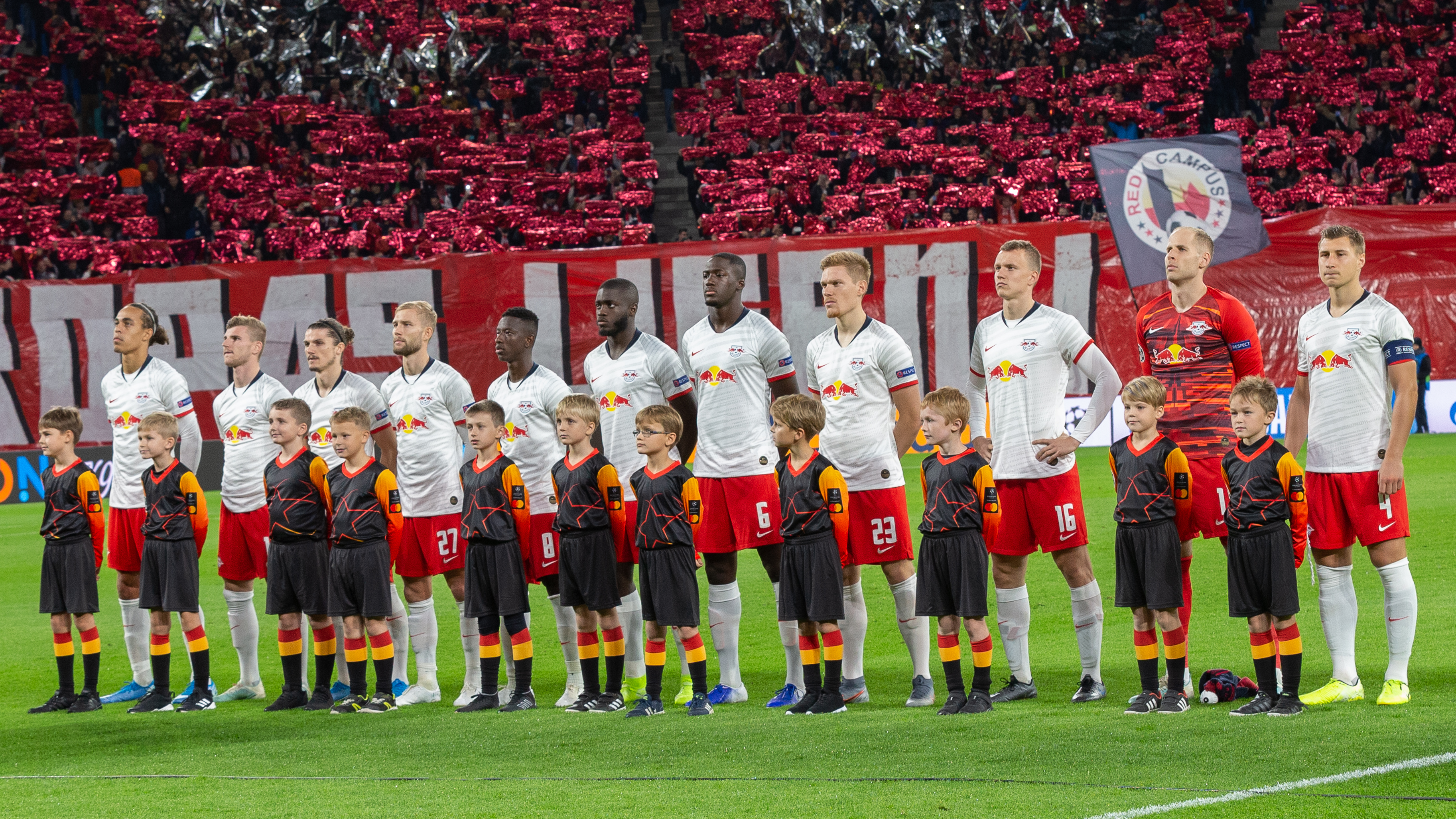 Fußball, Männer, UEFA Champions League, RB Leipzig - Olympique Lyonnais; Mannschaftsfoto, Aufstellung, team photo RB Leipzig